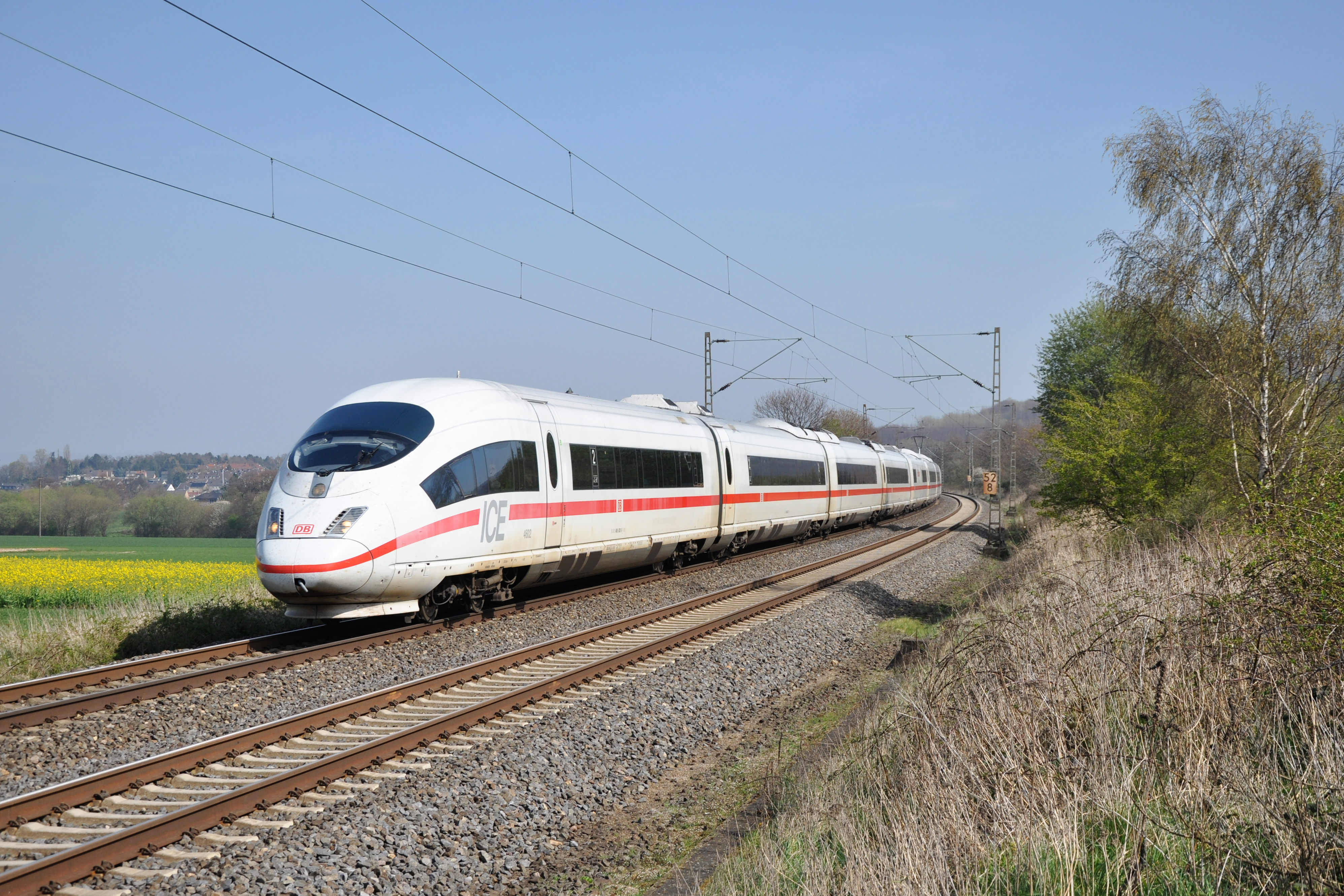 406 002 / DB Fernverkehr // Eschweiler / März 2014